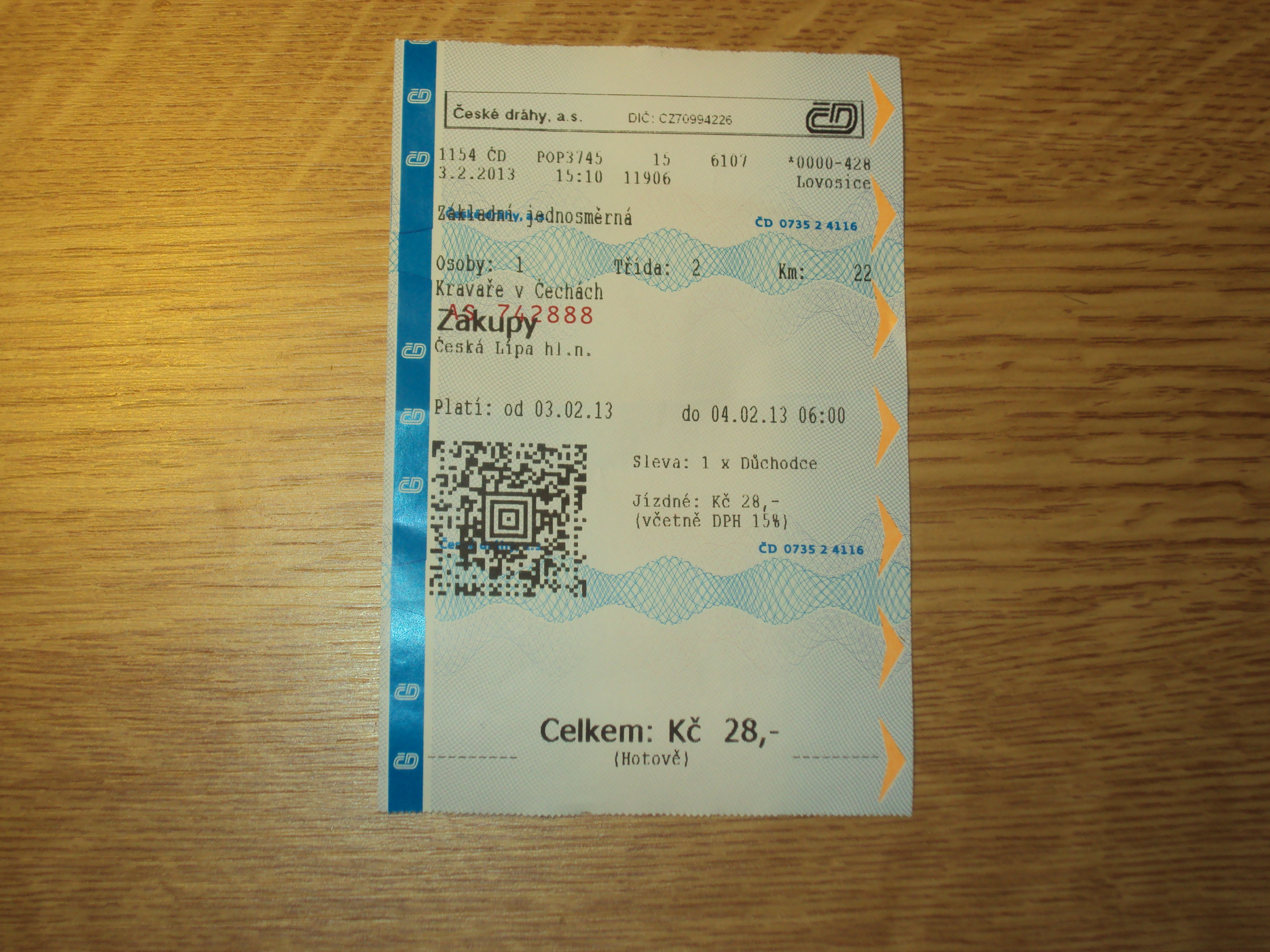 Česky: Vlaková jízdenka s novým kódem